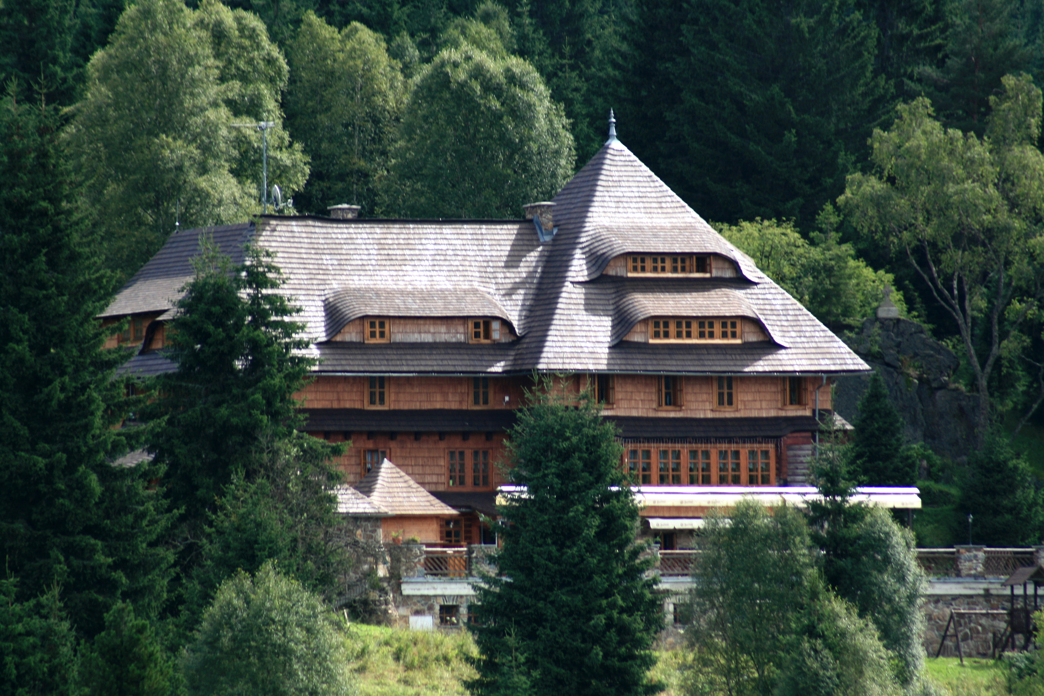 Turistická chata Klostermannova (Modrava), Modrava 4